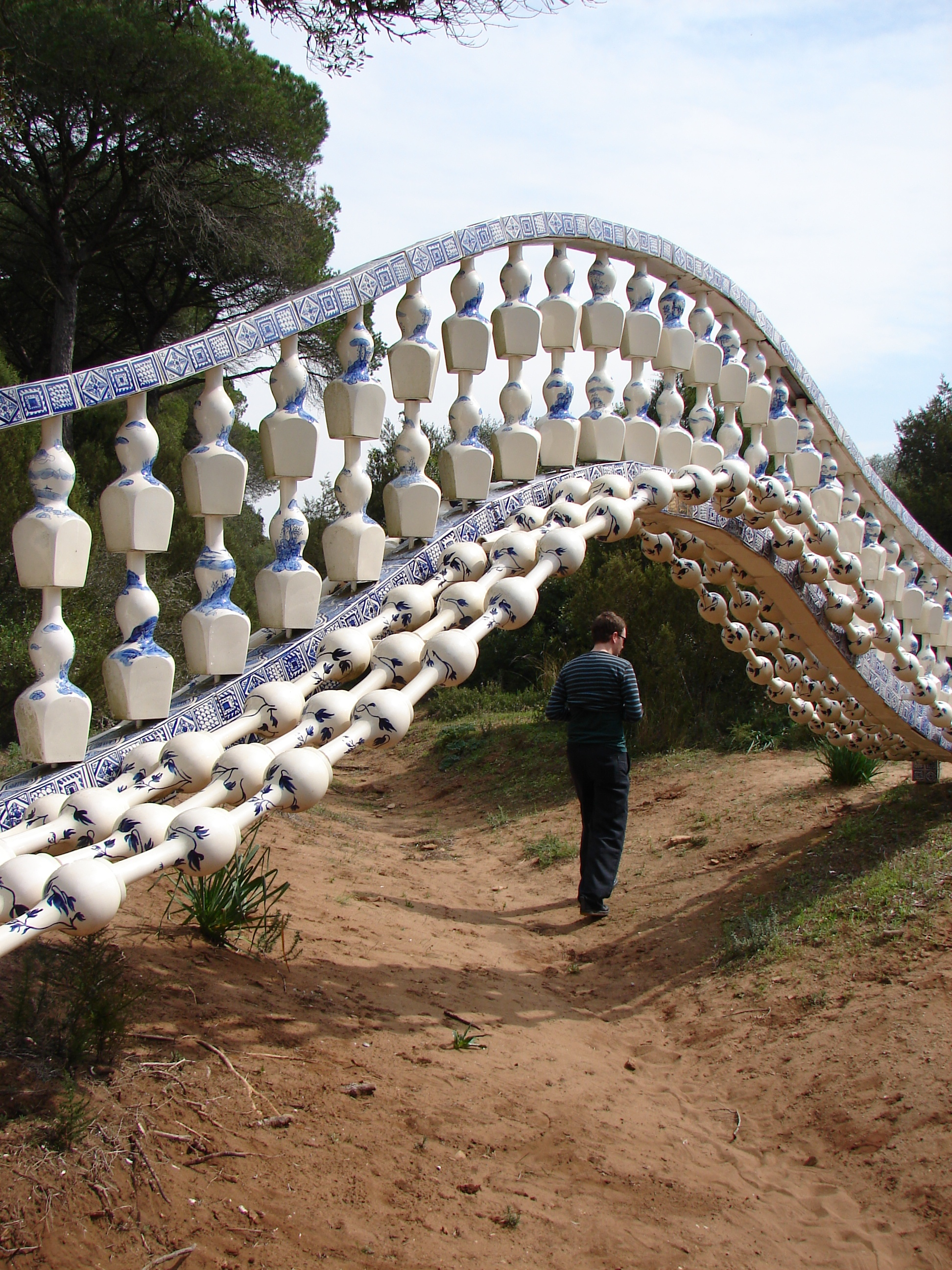 Puente by Shen Yuan at Fundación NMAC